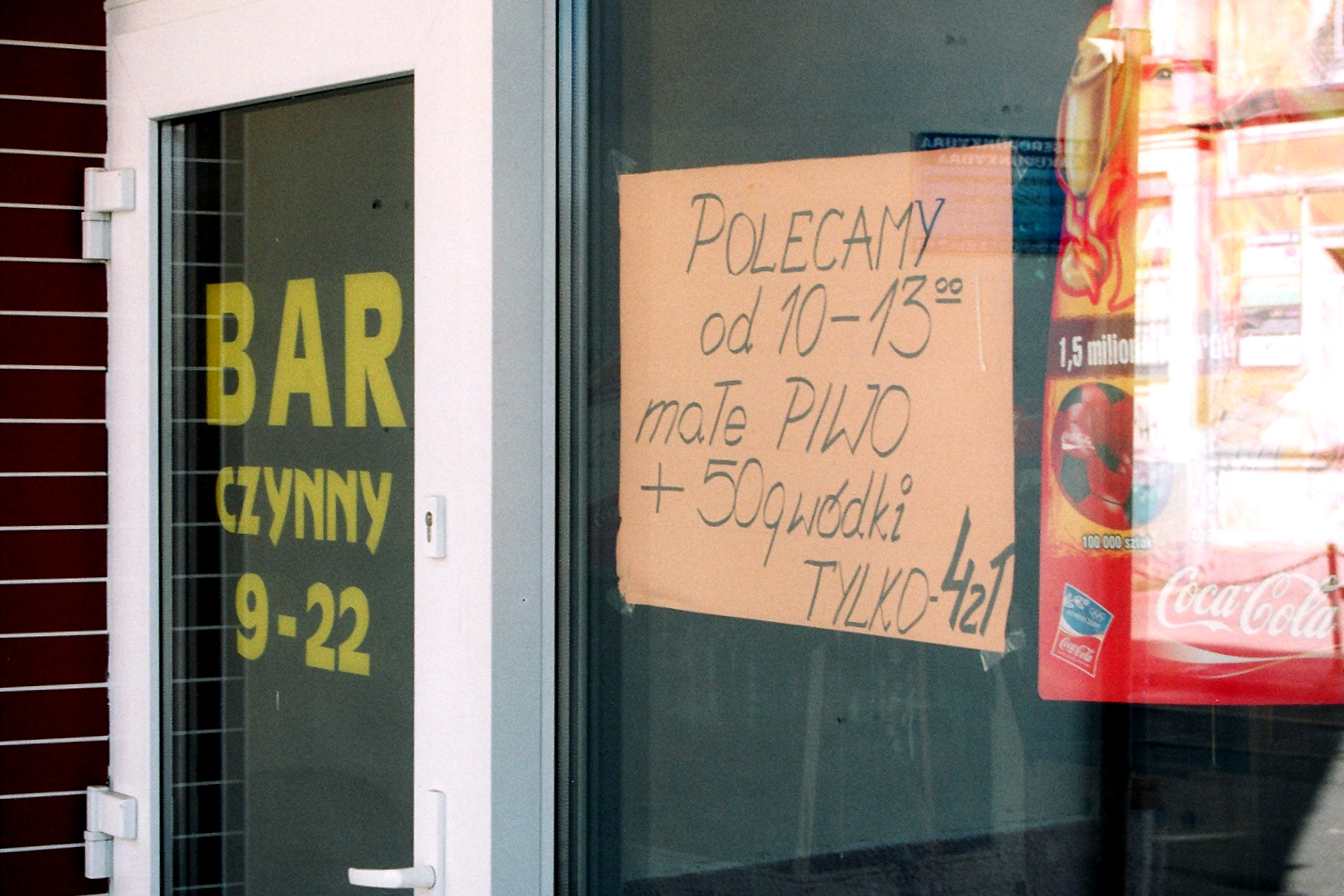 Marketing lat 90 XX w.